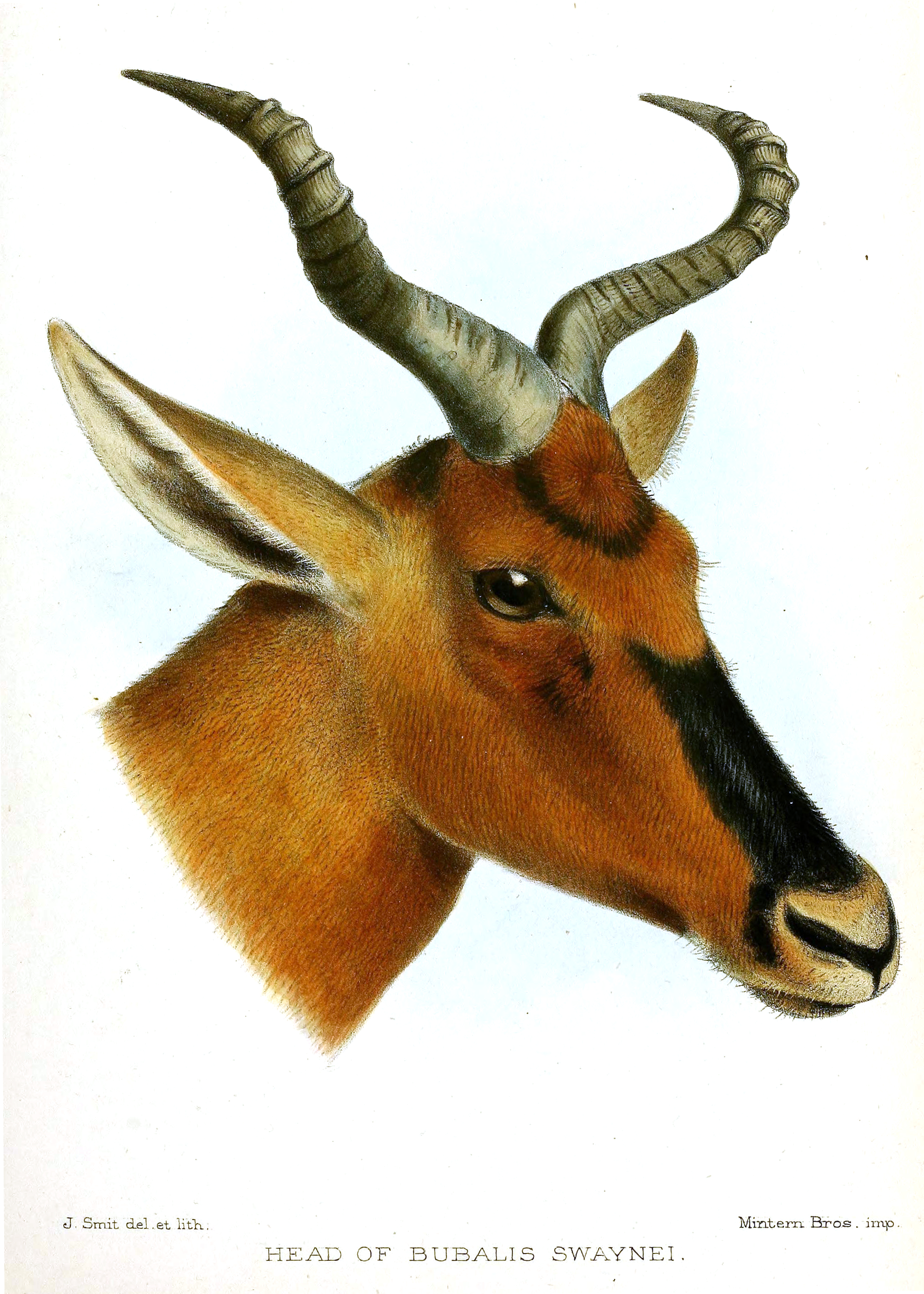 Bubalis swaynei